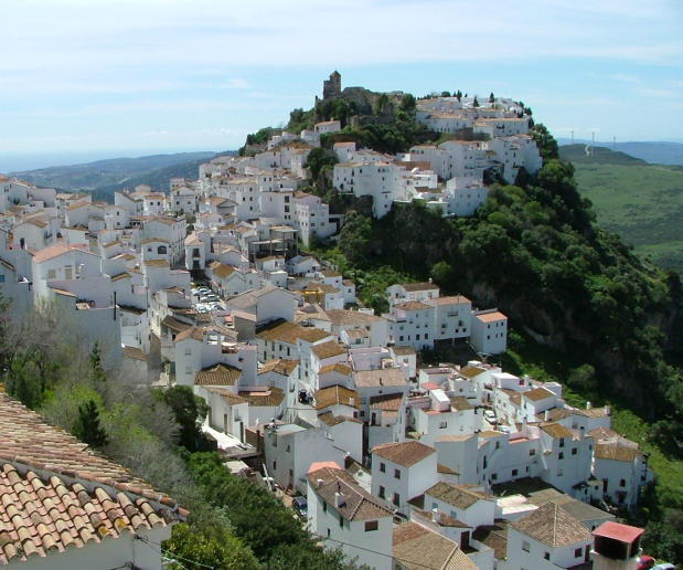 Casares - Blick auf das Dorf